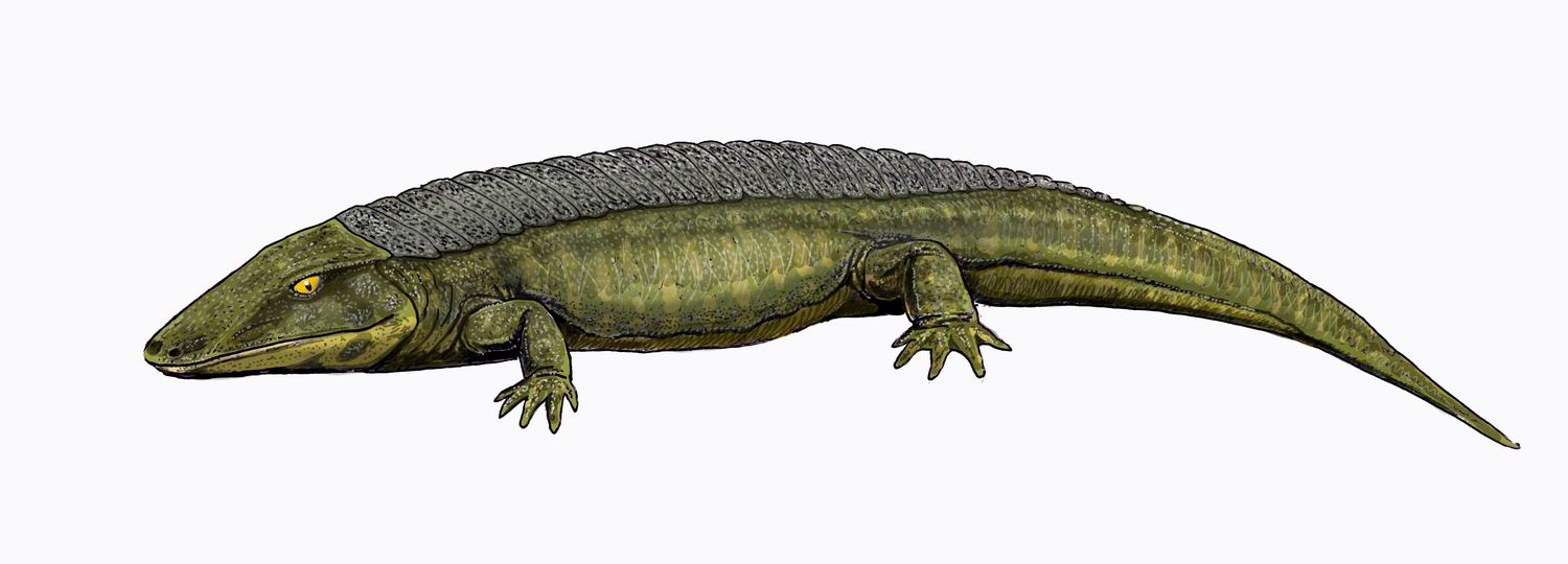 Chroniosuchus paradoxus, autor - Bogdanov,2006